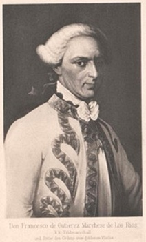 Francesco de Los Rios (1689-1775), kaiserlicher Feldmarschall